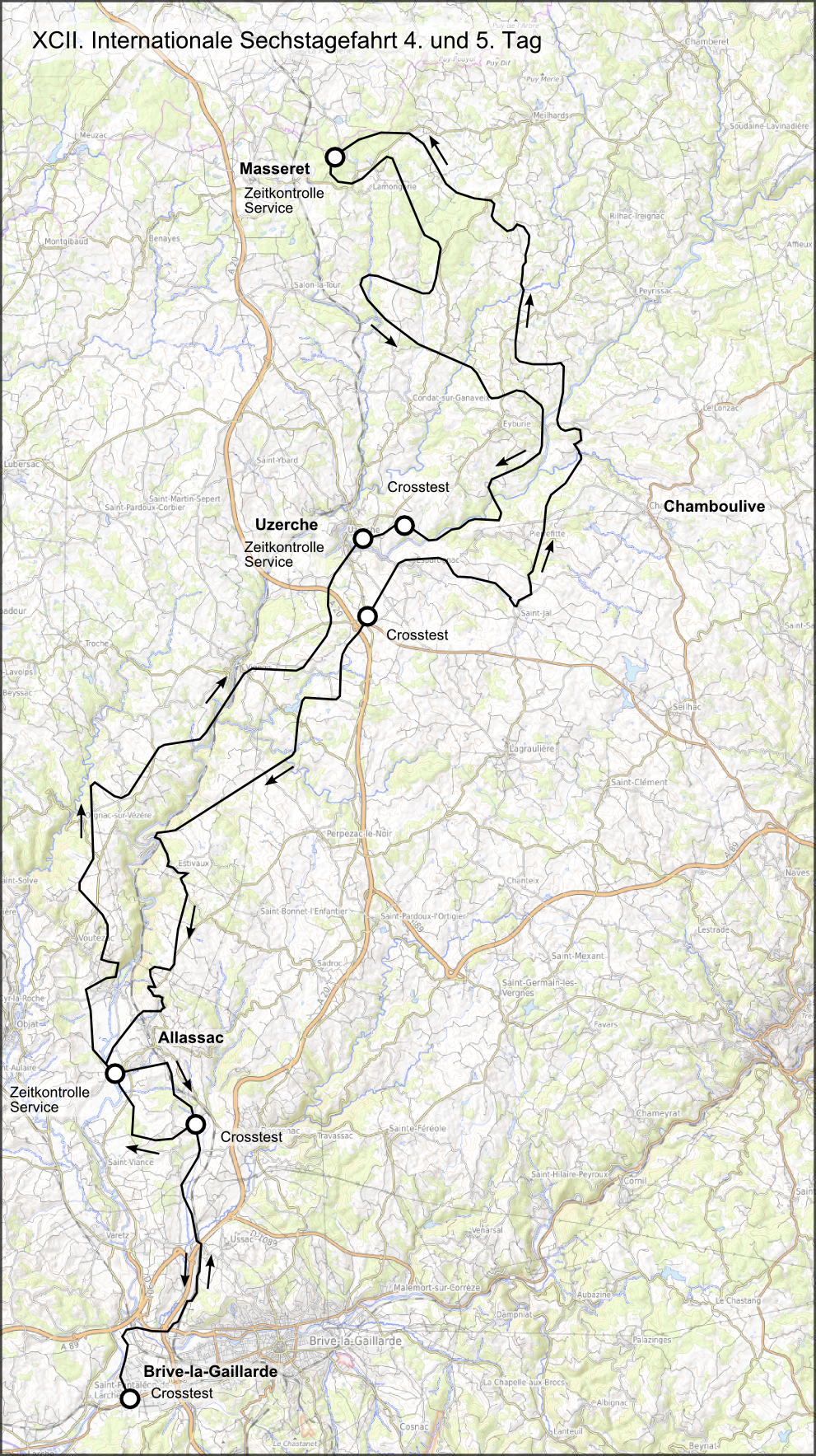 Karte der 92. Internationale Sechstagefahrt, Route des 4. und 5. Tages